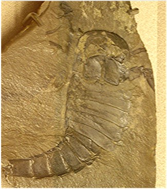 Eurypterus eigen foto